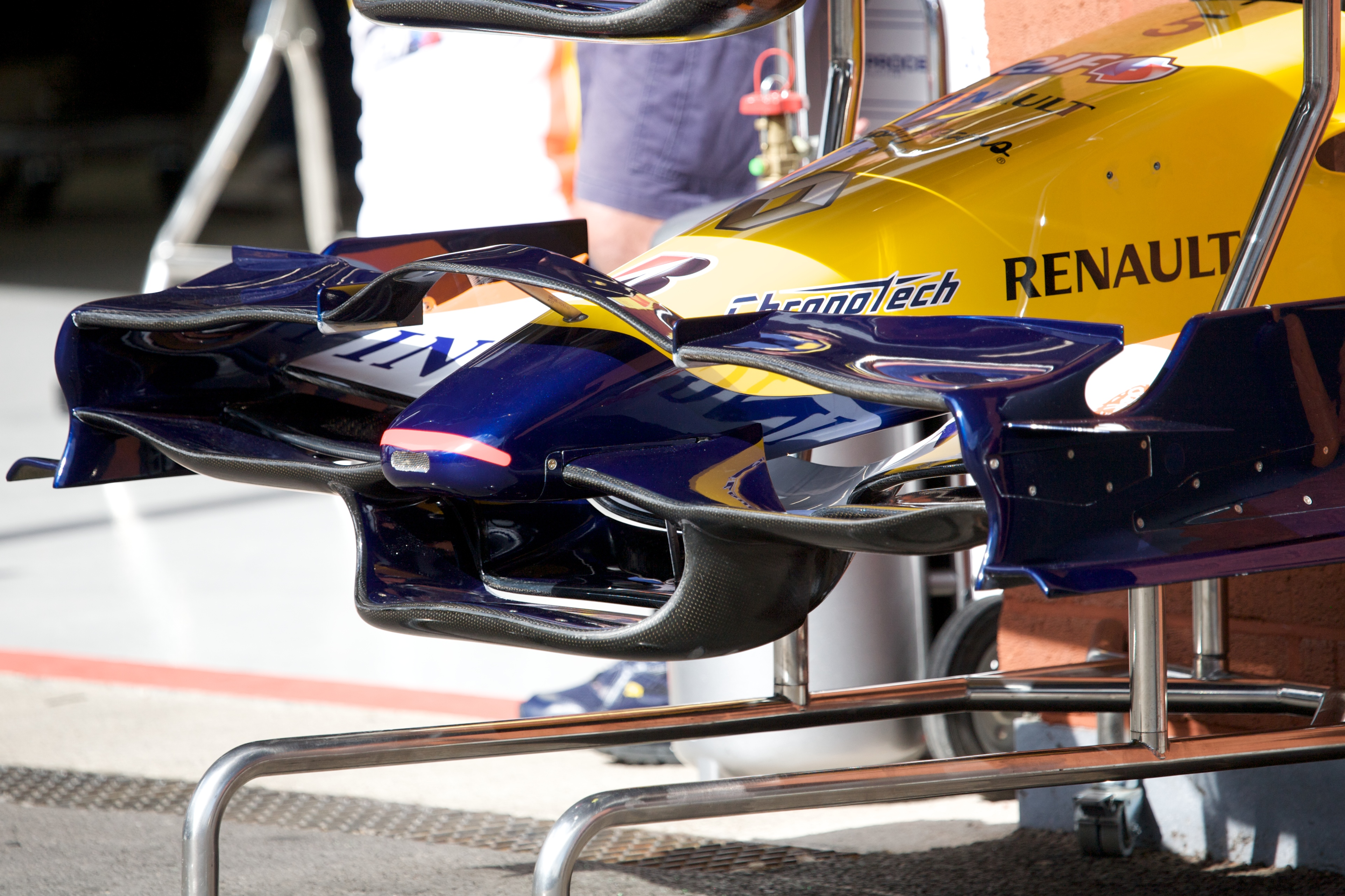 Renault R28 nose